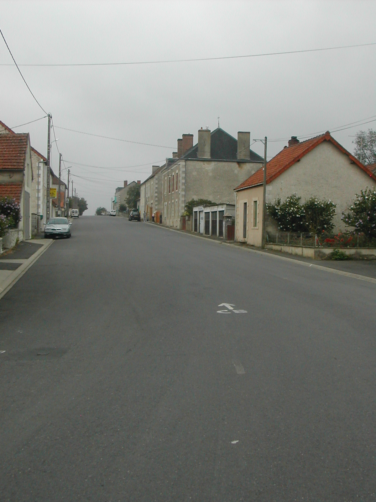 La rue principale des herolles